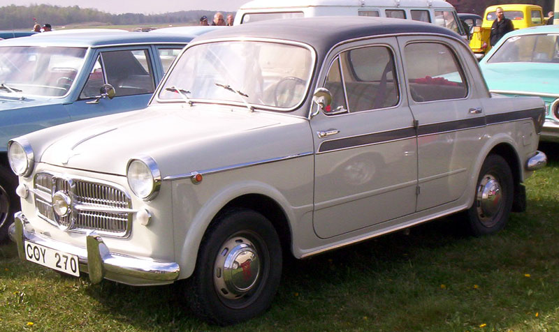 Fiat Nsu 1100 Neckar 4-Door Sedan 1959